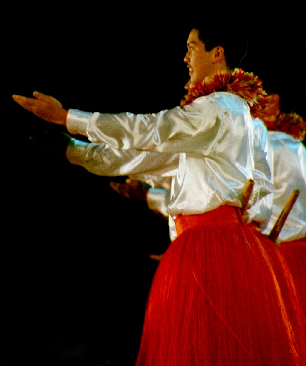 Tänzer mit pūʻili beim Hula ʻauana, Merrie Monarch Festival 2003, Hilo, Hawaiʻi, USA; Pentax Z 20, Tamron Zoom AF/MF 3,8-5,6/28-200 mm aspherical